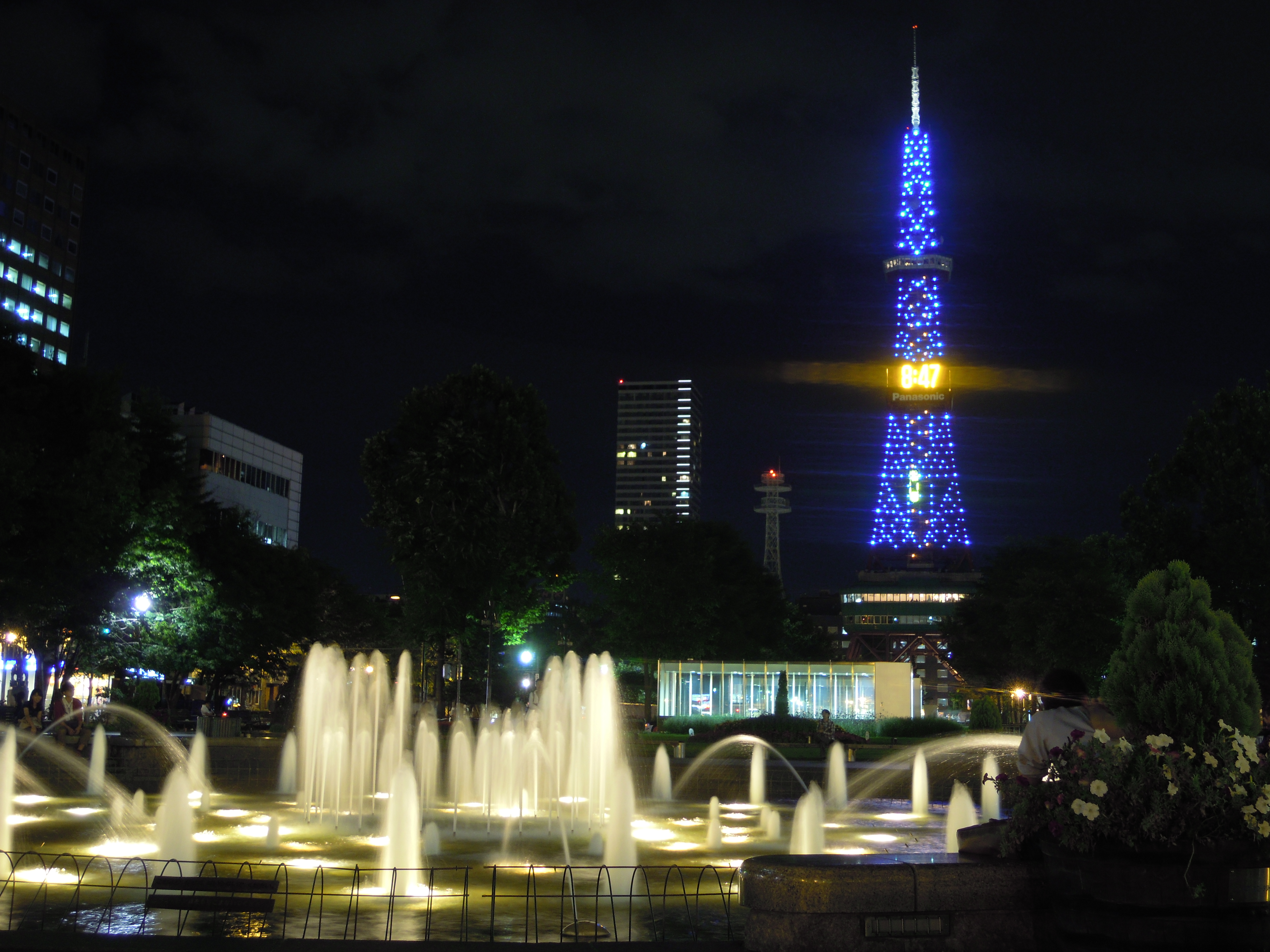 夜のテレビ塔と大通公園の噴水